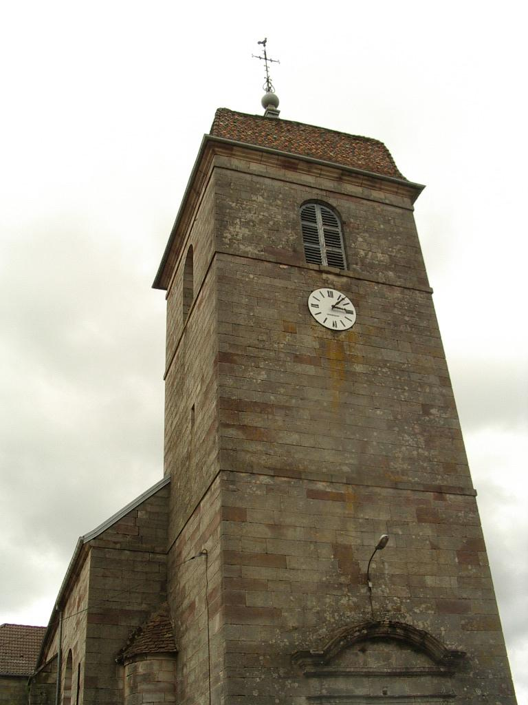 Eglise Saint Madeleine Sainte Marie en chanois